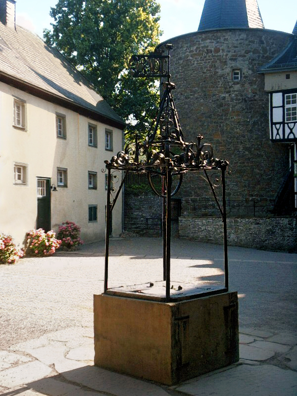 Schloss Hohenlimburg, Bergfried, Deutsches Kaltwalzmuseum, 2004